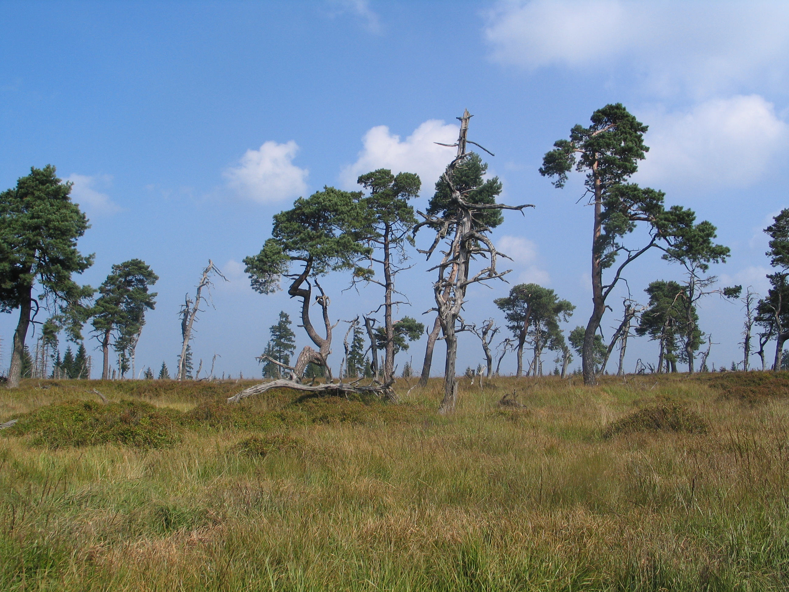 Noir Flohay. Jean Naessens pour « Les Amis de la Fagne Â.